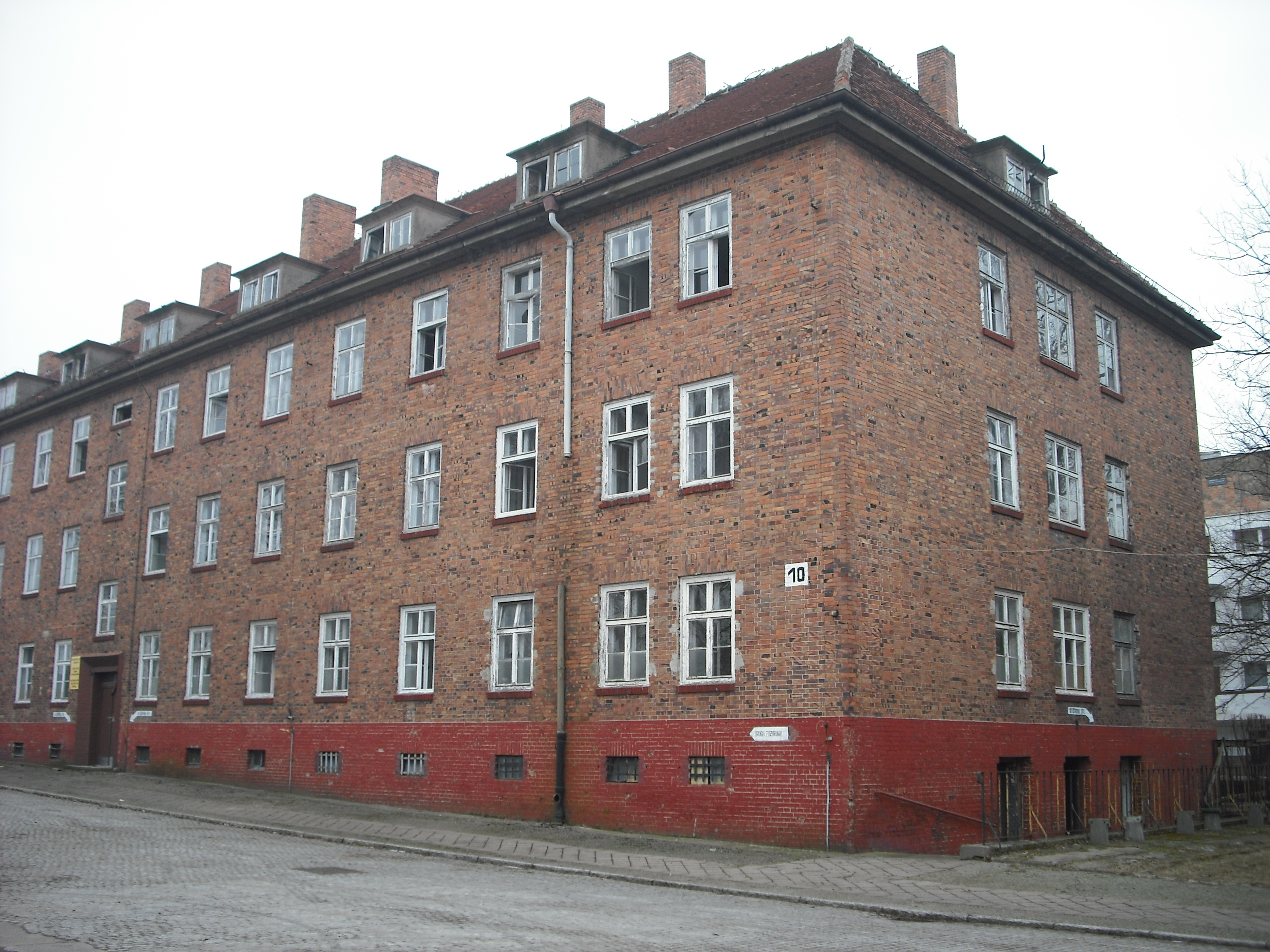 Opuszczone koszary w Szczecinie w kompleksie przy ul. Mickiewicza. W latach 80. XXw stacjonował tu 20 dywizjon rakiet taktycznych Wlatach 89-91 na parterze znajdowało się pomieszczenie Oficera Dyżurnego i pomieszczenie dalekopisu